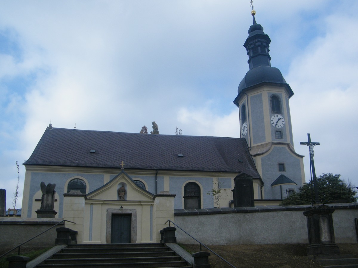 Kostel svatého Bartoloměje ve Velkém Šenově po rekonstrukci